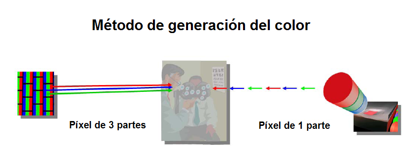 Modelos de generación de color modificada documento UniPixel.